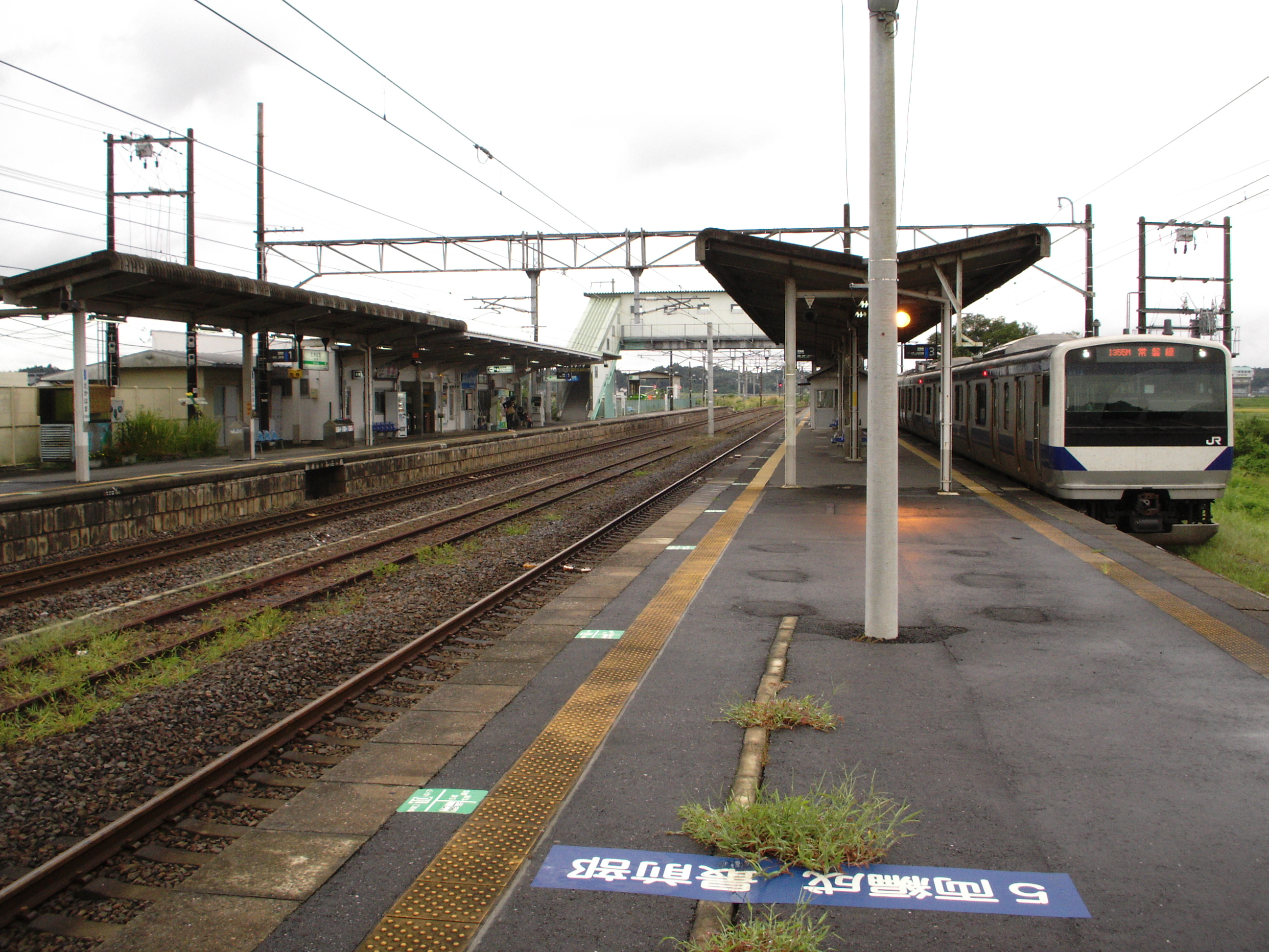 高浜駅プラットホーム